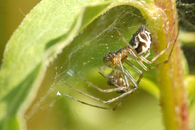 Frontinellina frutetorum from Commanster, Belgian High Ardennes .